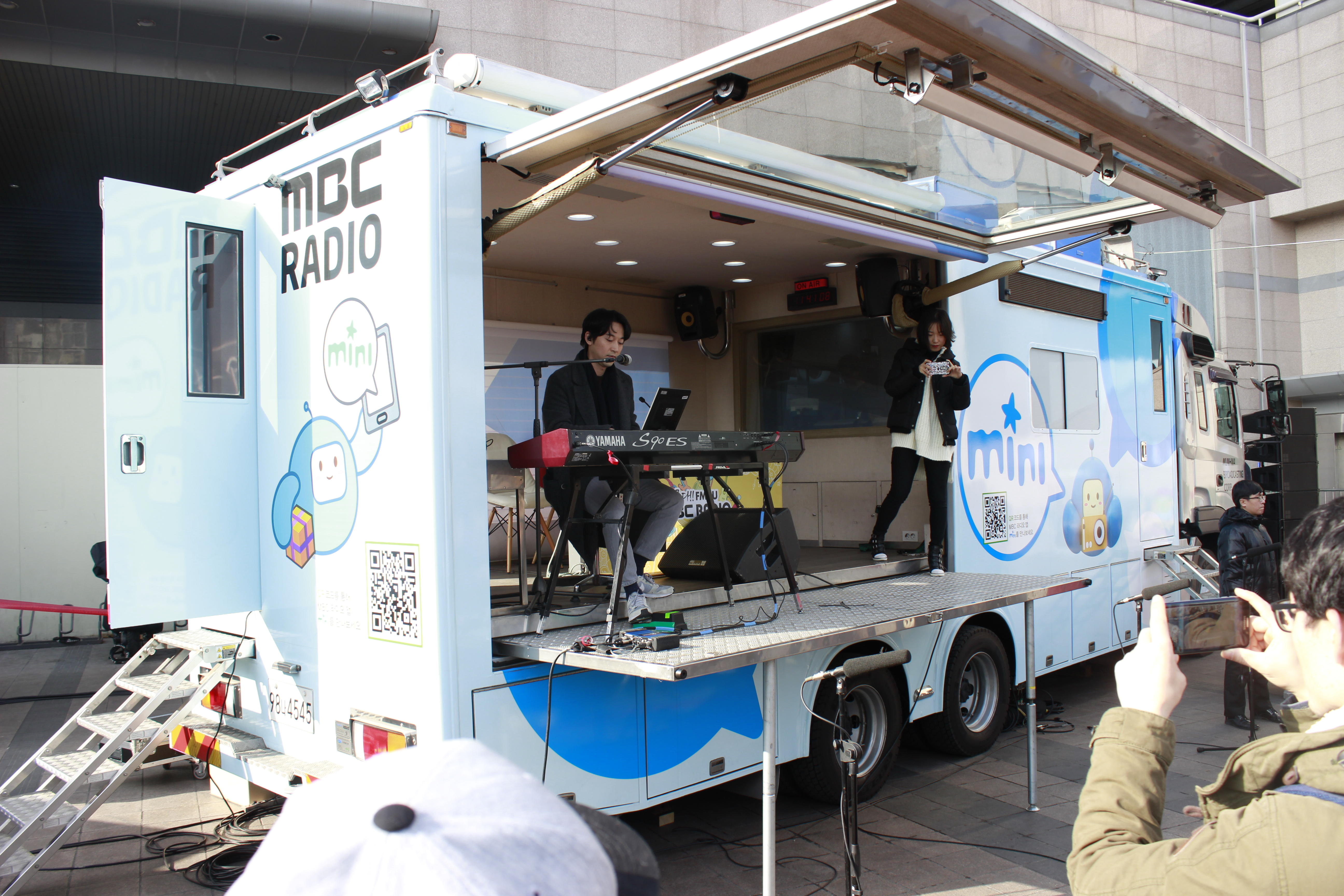 경기도 수원시에서 2017년 열린 이루마의 골든디스크 공개 방송